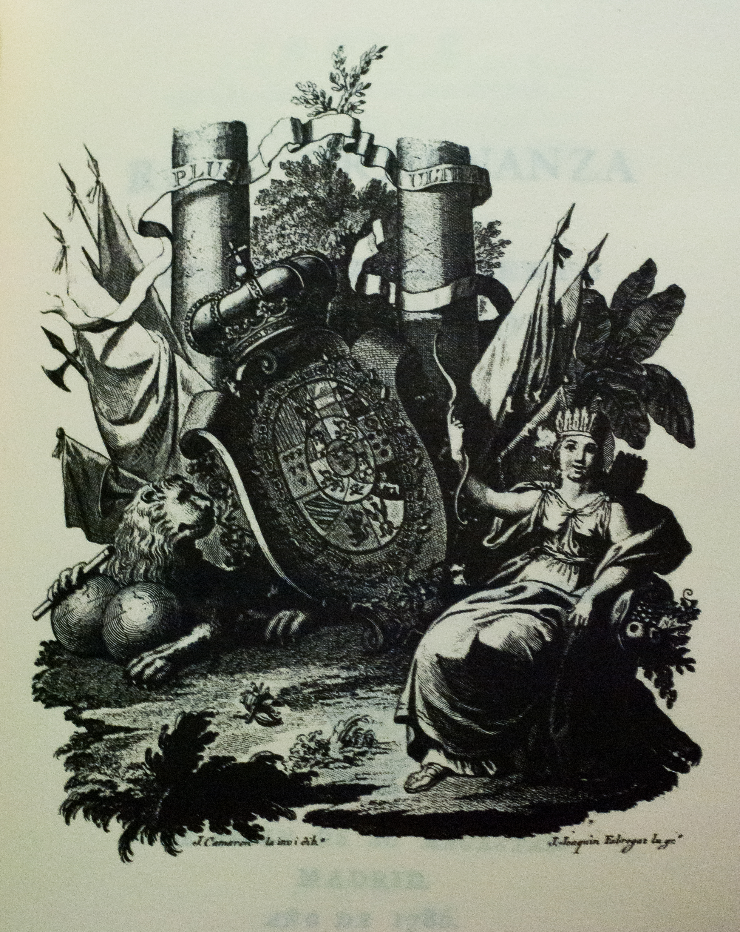 Grabado que sirve como portada en la Ordenanza que estableció las intendencias en el virreinato de Nueva España en 1786.